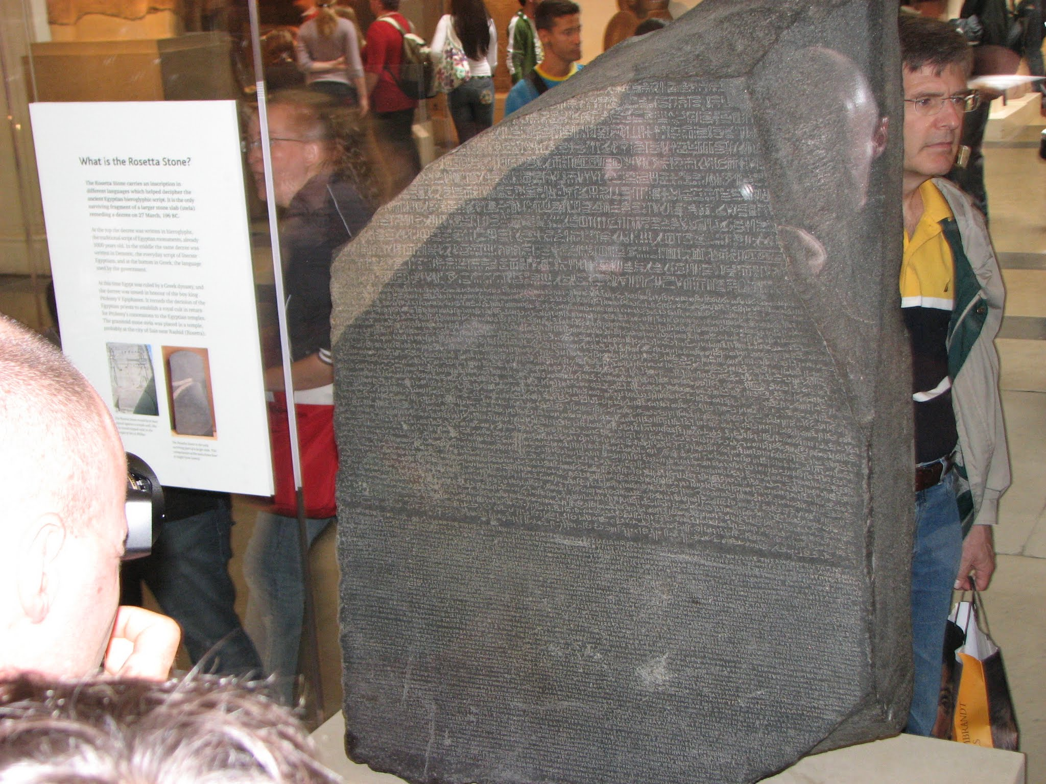 London